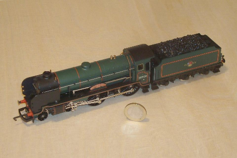 Schlepptender-Dampflokomotive der Spur 00 des Englischen Modelleisenbahnherstellers Hornby. Grössenvergleich mit einer ein Euro Münze. Der Schlepptender der Damplokomotive ist mit Made in Great Britain beschriftet. SR V "Schools" class Lokomotive mit dem Namen Westminster, Achsfolge 4-4-0, in der Ausführung der ehemaligen Britisch Railways.